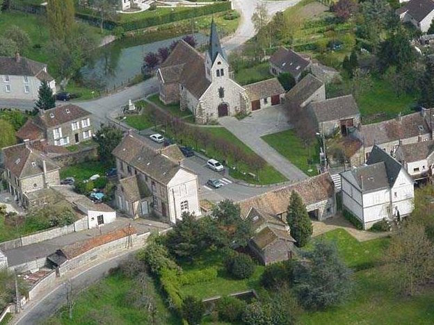 vue aérienne du centre de la Chapelle Rablais